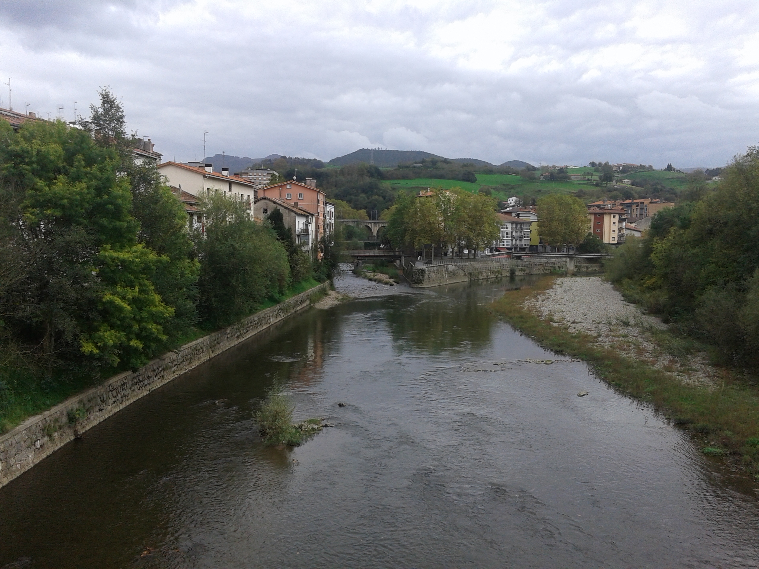 Puntu horretan bi ibaiek bat egiten dute.